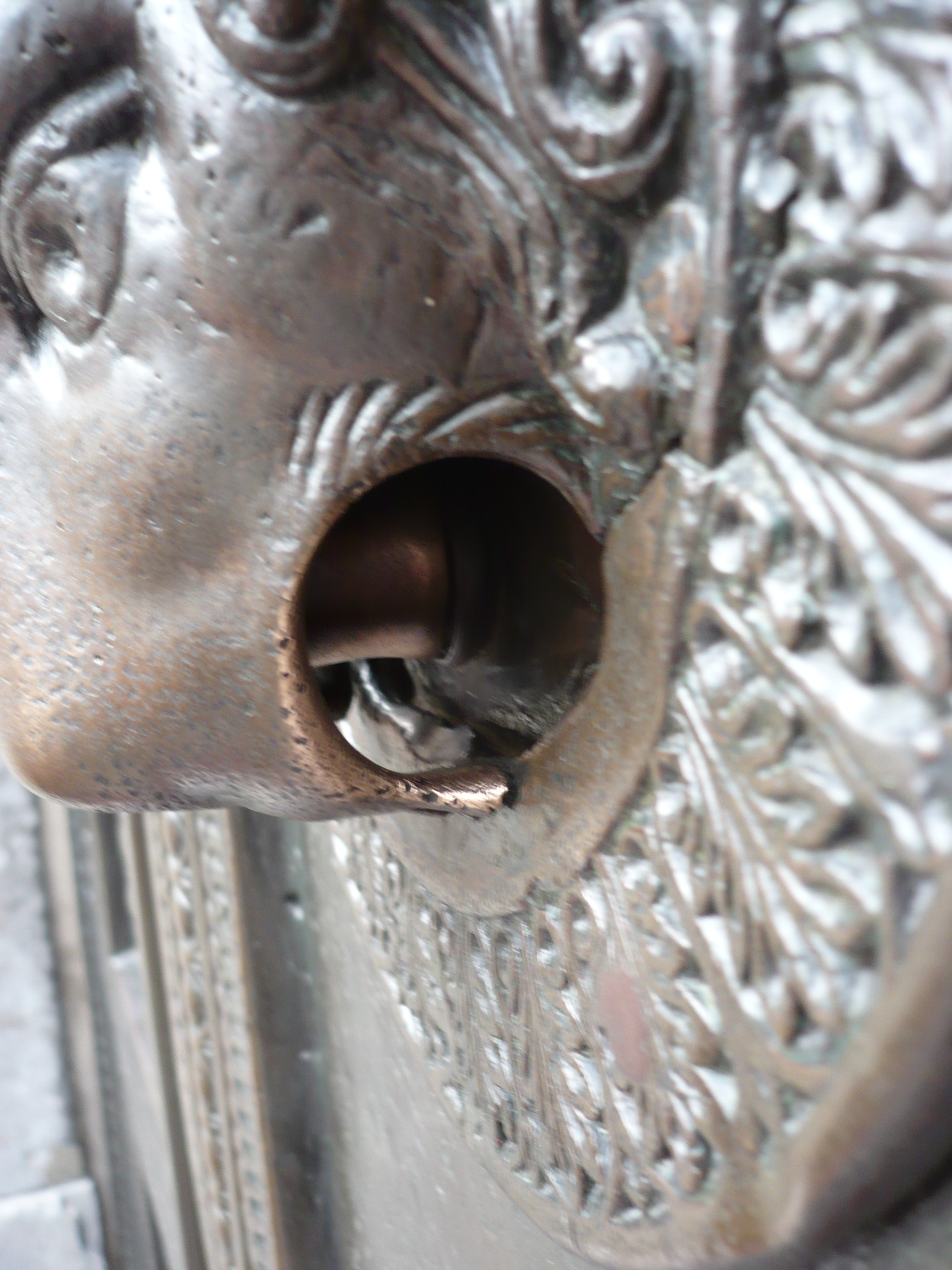 Detail "Teufelsdaumem" an der Wolfstür des Aachener Domes. Die als Löwenmaul gearbeiteten Griffe der um 800 nach Christus entstandenen doppelflügigen Tür haben nur im Griff des von außen gesehen rechten Türflügels innen einen Bronzestift. Seine Funktion ist nicht restlos geklärt. Der Stift wird landläufig als der sagenhafte Daumen des Teufels gedeutet, den dieser der Dombausage nach dort verlor.